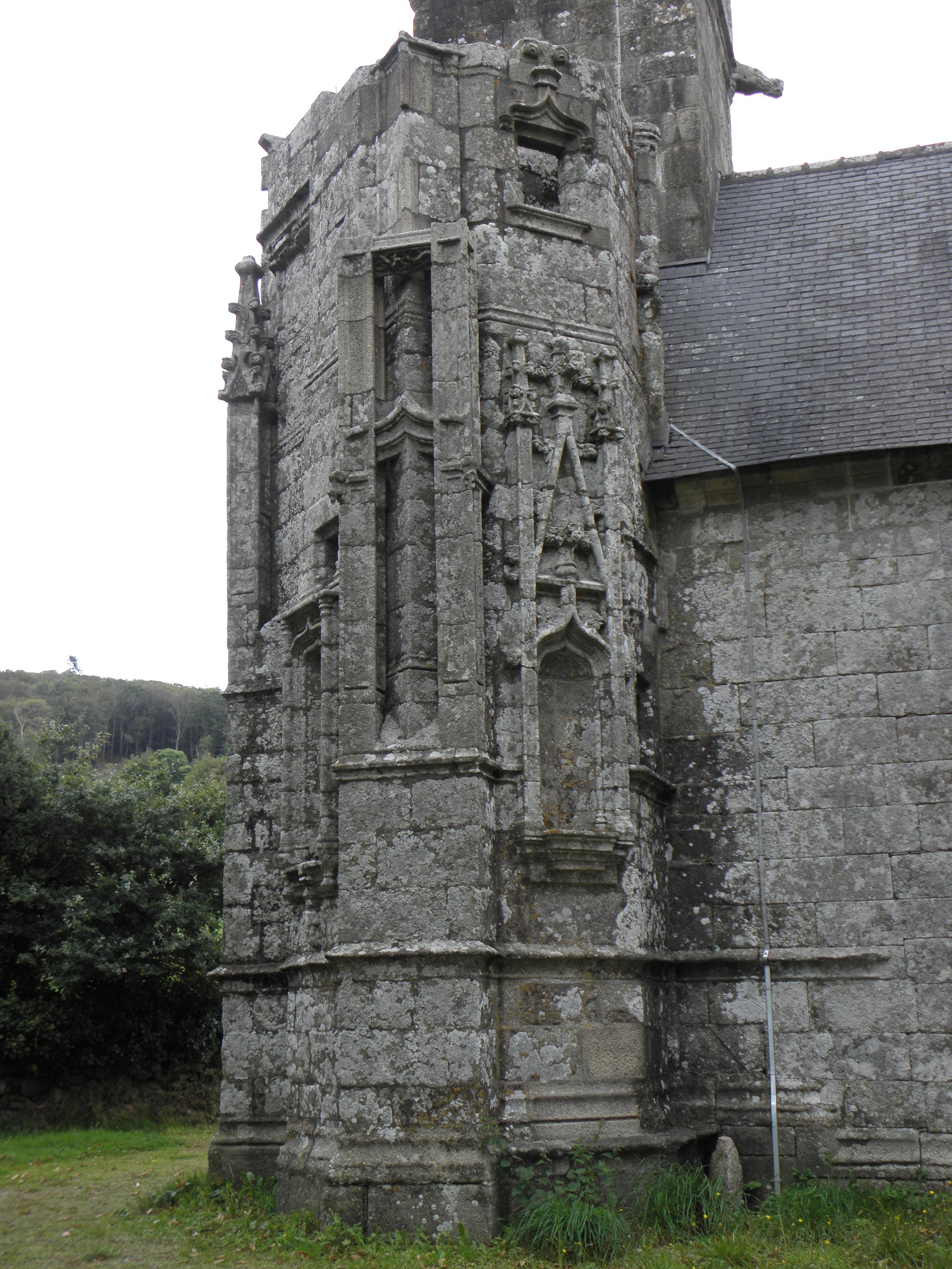 Tourelle sud de la tour-clocher de la chapelle Saint-Théleau de Plogonnec (29). .